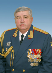 Командующий войсками Южного военного округа генерал-полковник Галкин Александр Викторович